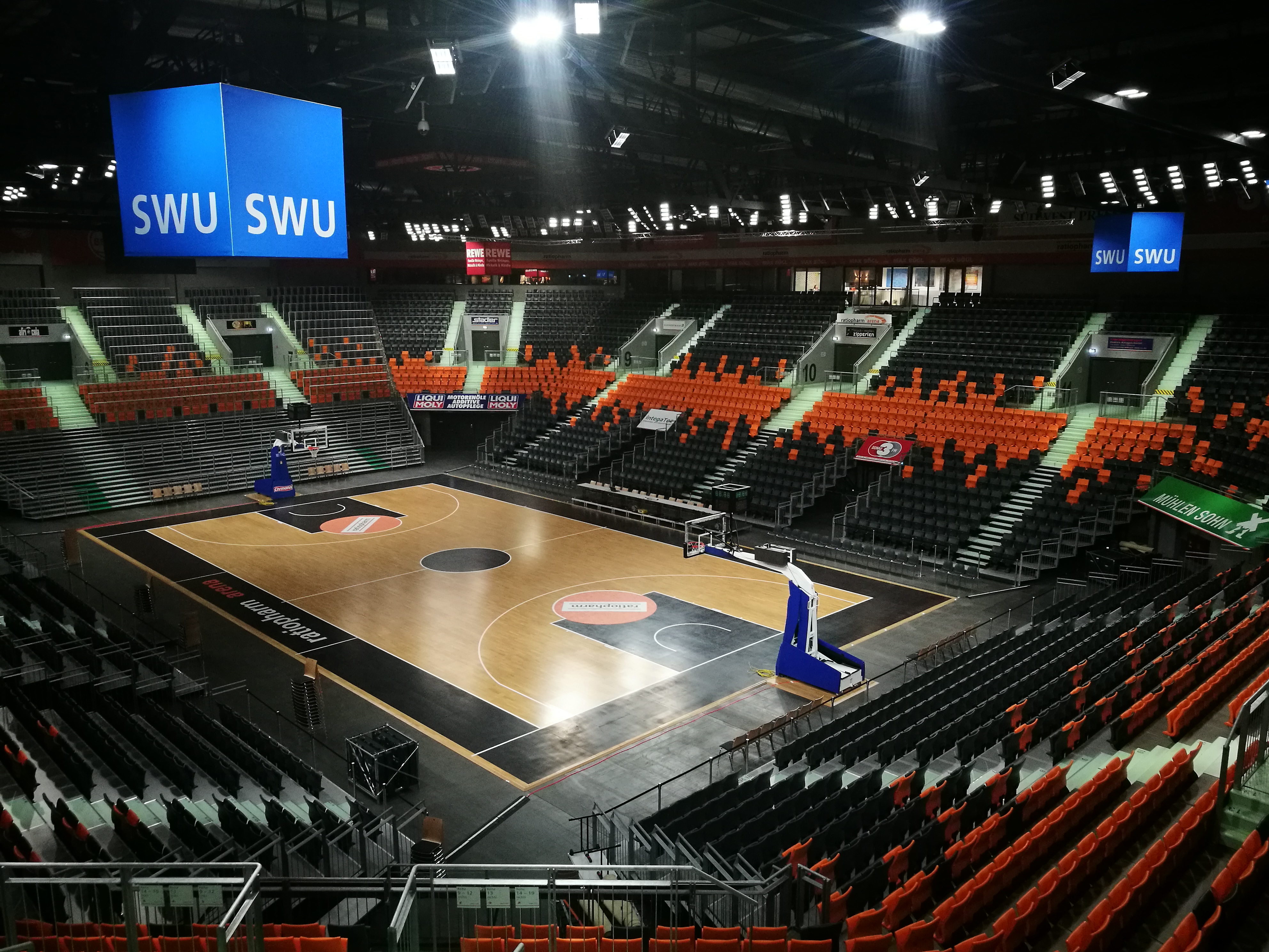 Deutschland (D) - Bayern (BY) - Landkreis Neu-Ulm (NU) - Neu-Ulm: Innenansicht der Ratiopharm-Arena